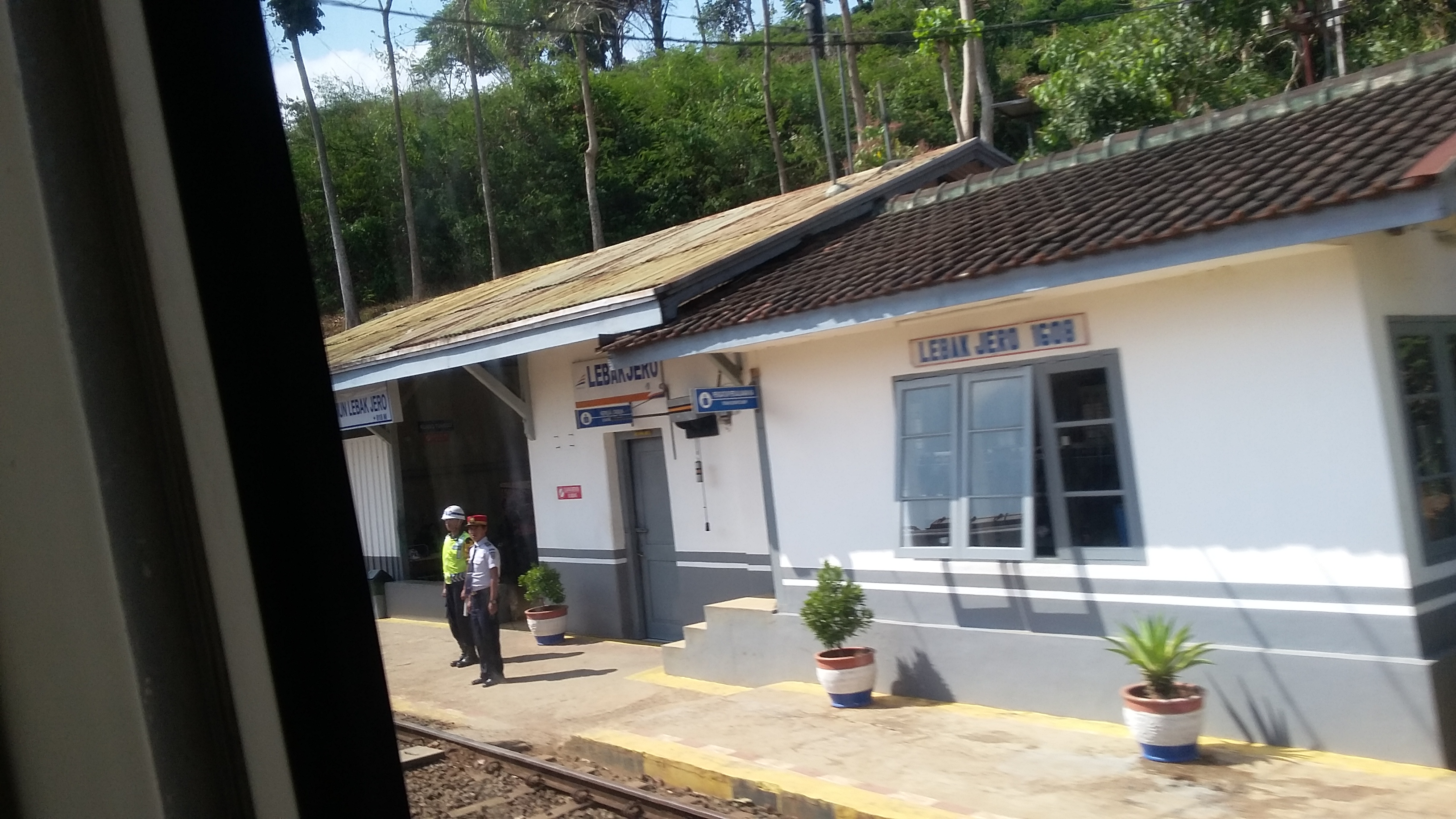 Stasiun Lebakjero